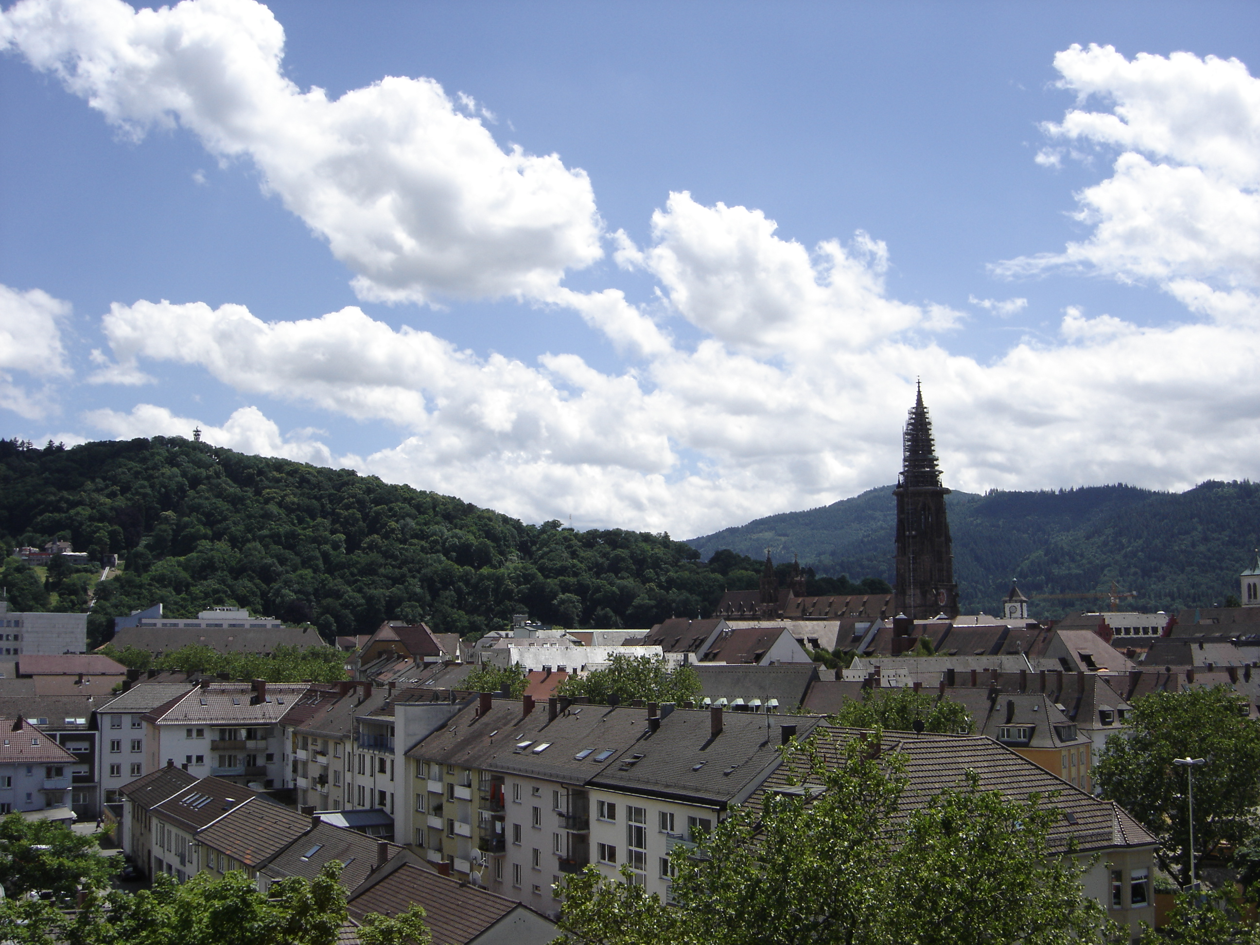 Blick von der Dachterrasse des Rektorats der Uni Freiburg am Fahnenbergplatz